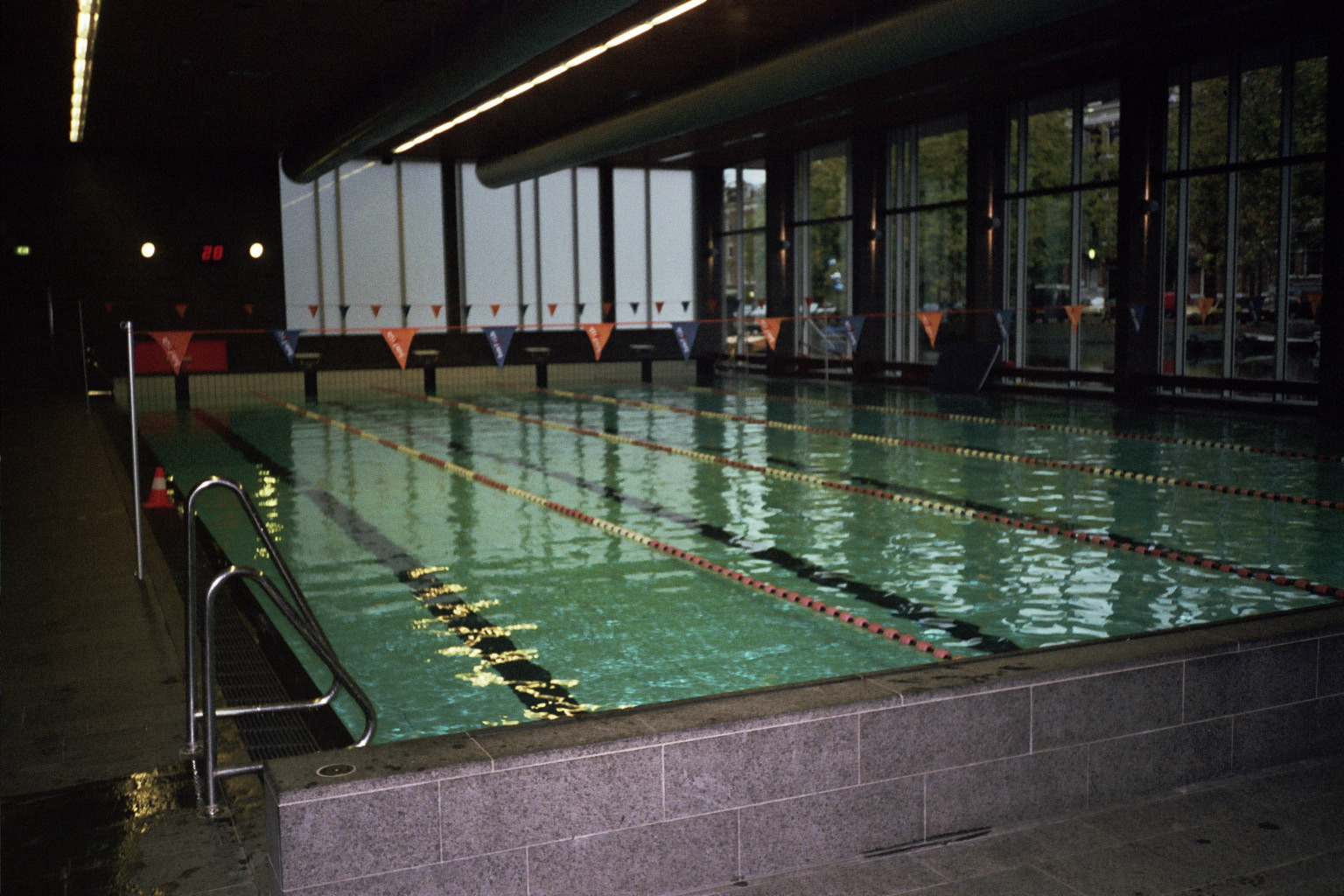 Het Marnix, zwembad in Amsterdam (vroeger: Marnixbad)